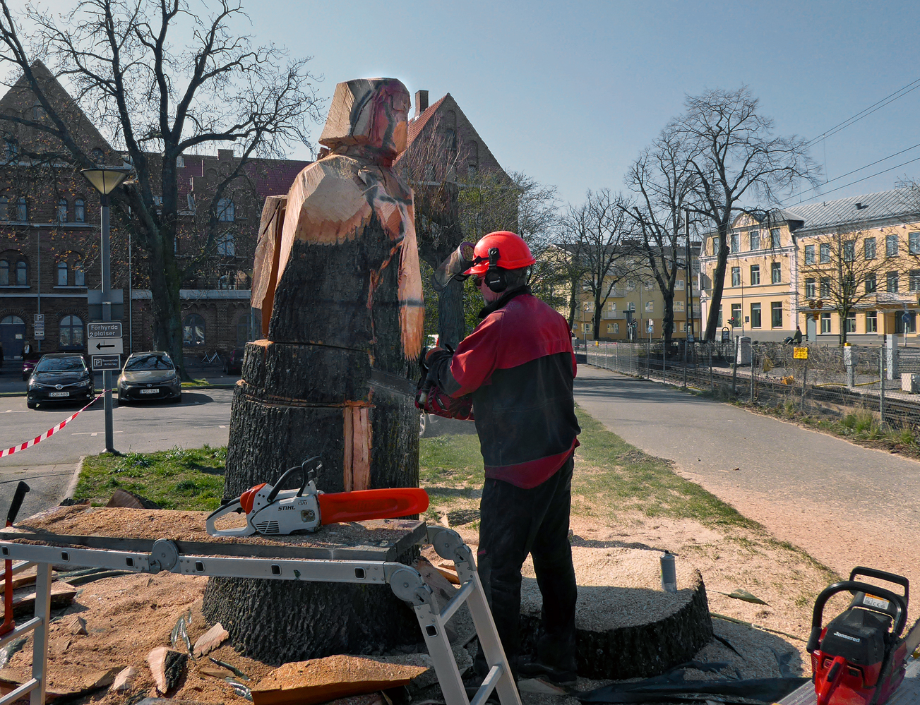 En skulptör hugger/sågar ut en figur i en trädstam vid centralstationen i Ystad 2020.